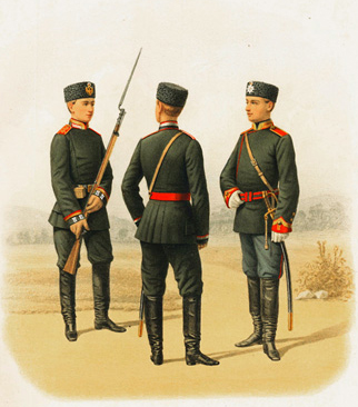 Военно-Учебные заведения. Фельдфебель Николаевского Инженерного Училища и Юнкер Николаевского Кавалерийского Училища в парадной и обыкновенной форме вне строя. Юнкер 1-го Павловского Военного Училища в парадной и обыкновенной строевой форме ( прик. по воен. вед. 1882 г. № 91. )